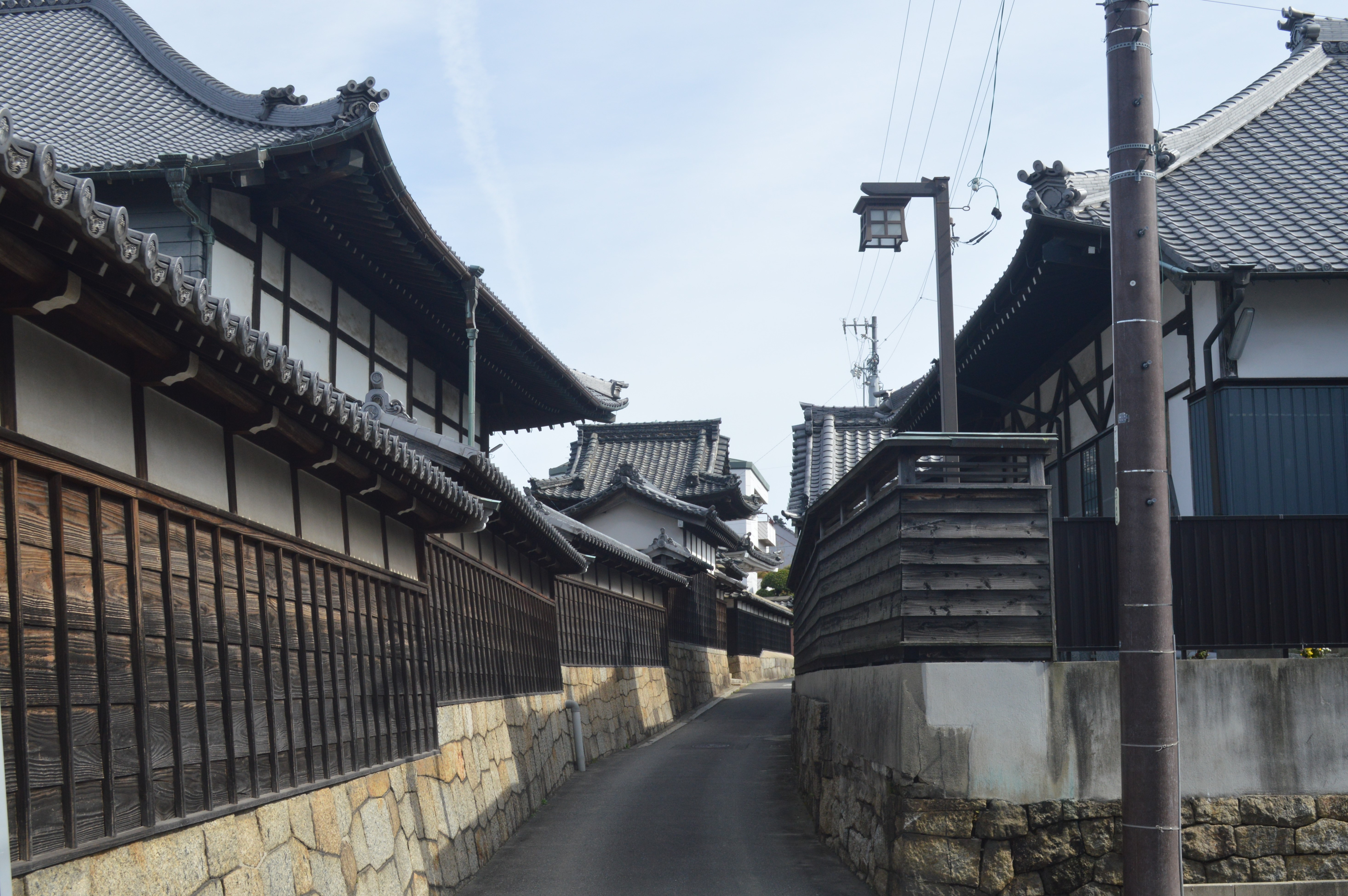 愛知県西尾市の順海通り。